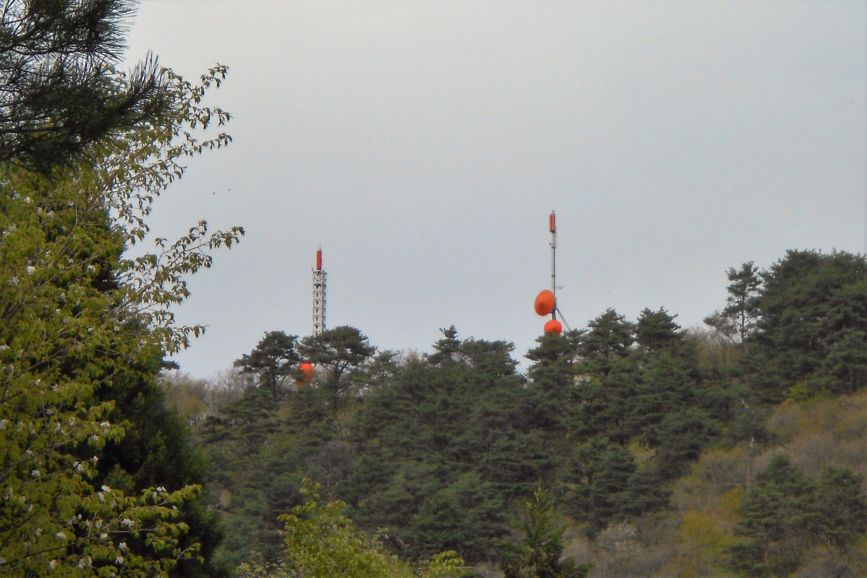 北秋田市 鞍山にあるテレビ中継局 右は鷹巣デジタルテレビ放送中継局（旧秋田朝日放送アナログ中継局）で、デジタル全社の電波を出している。 左はかつての秋田テレビ（ＡＫＴ）アナログ中継局